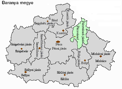 Magyarország, Baranya megye, Pécsváradi járás